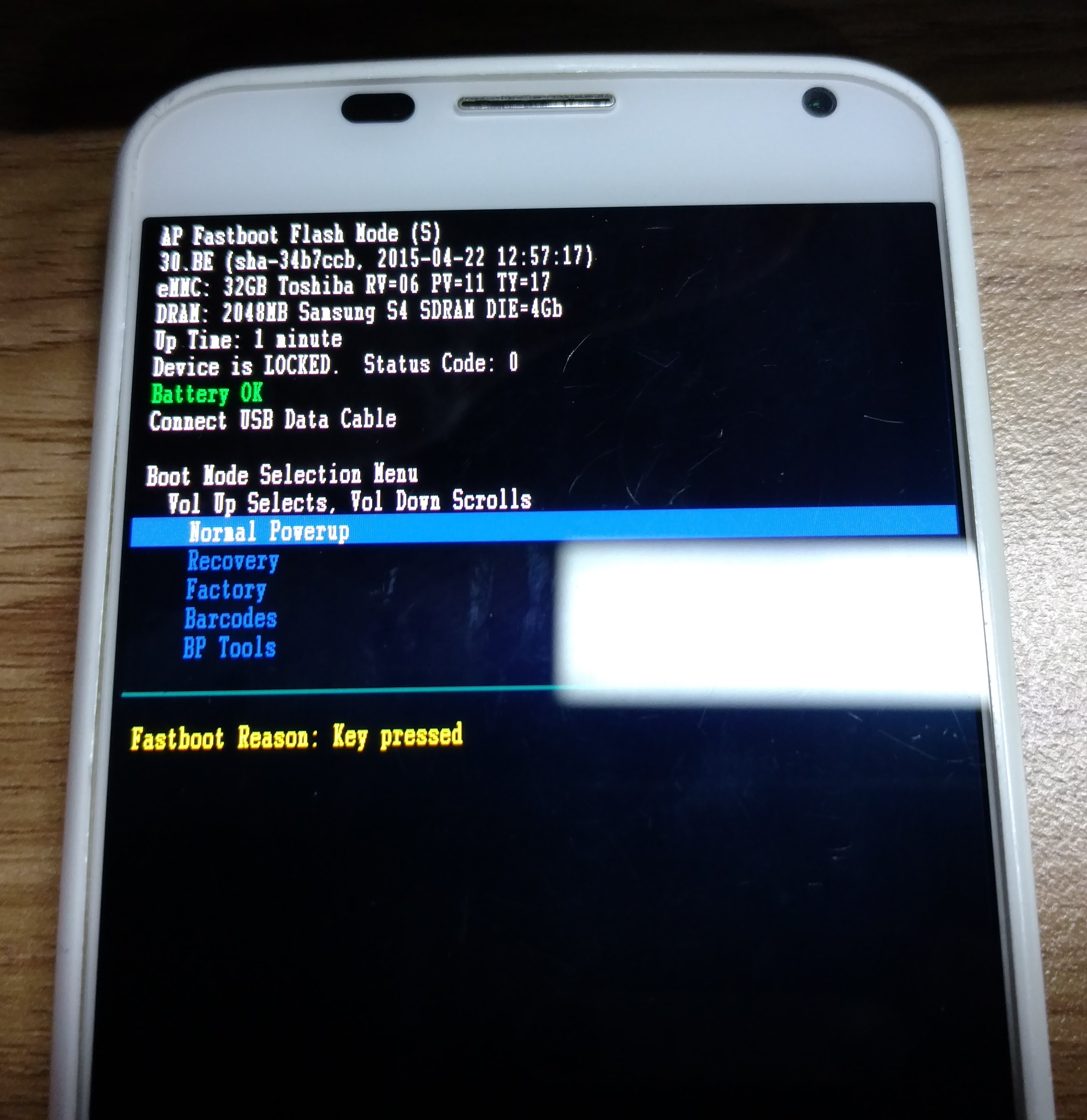 智能手机的引导界面。